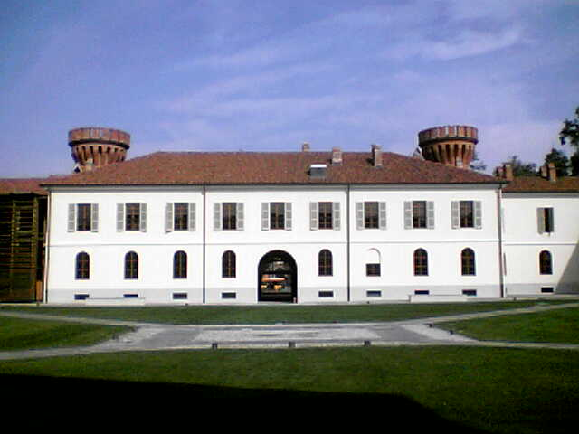 Università degli Studi di Scienze Gastronomiche, nel Castello di Pollenzo, foto di Mauro Avino, 2006